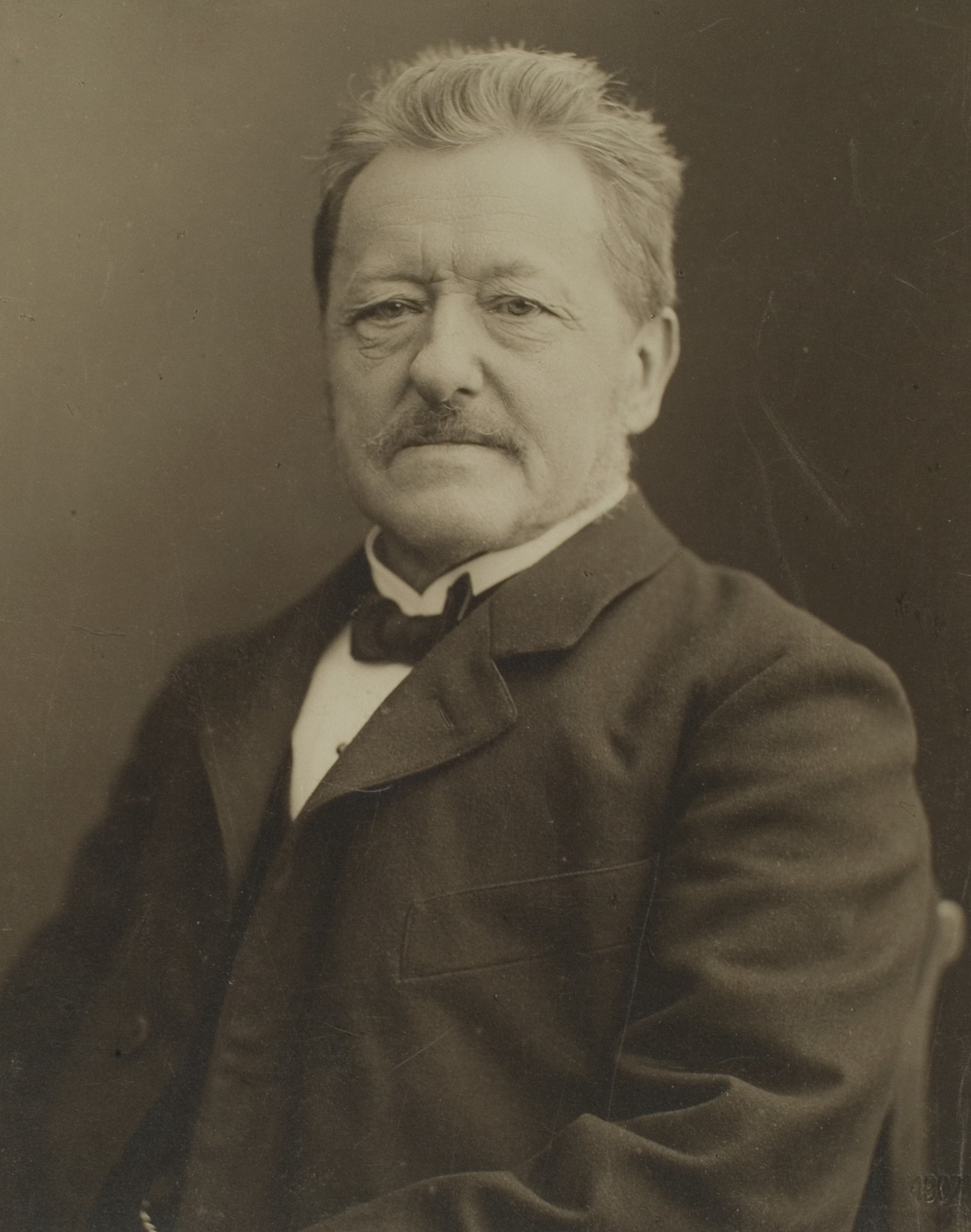 Richard Schröder, Jurist, 1887–1917 Professor in Heidelberg